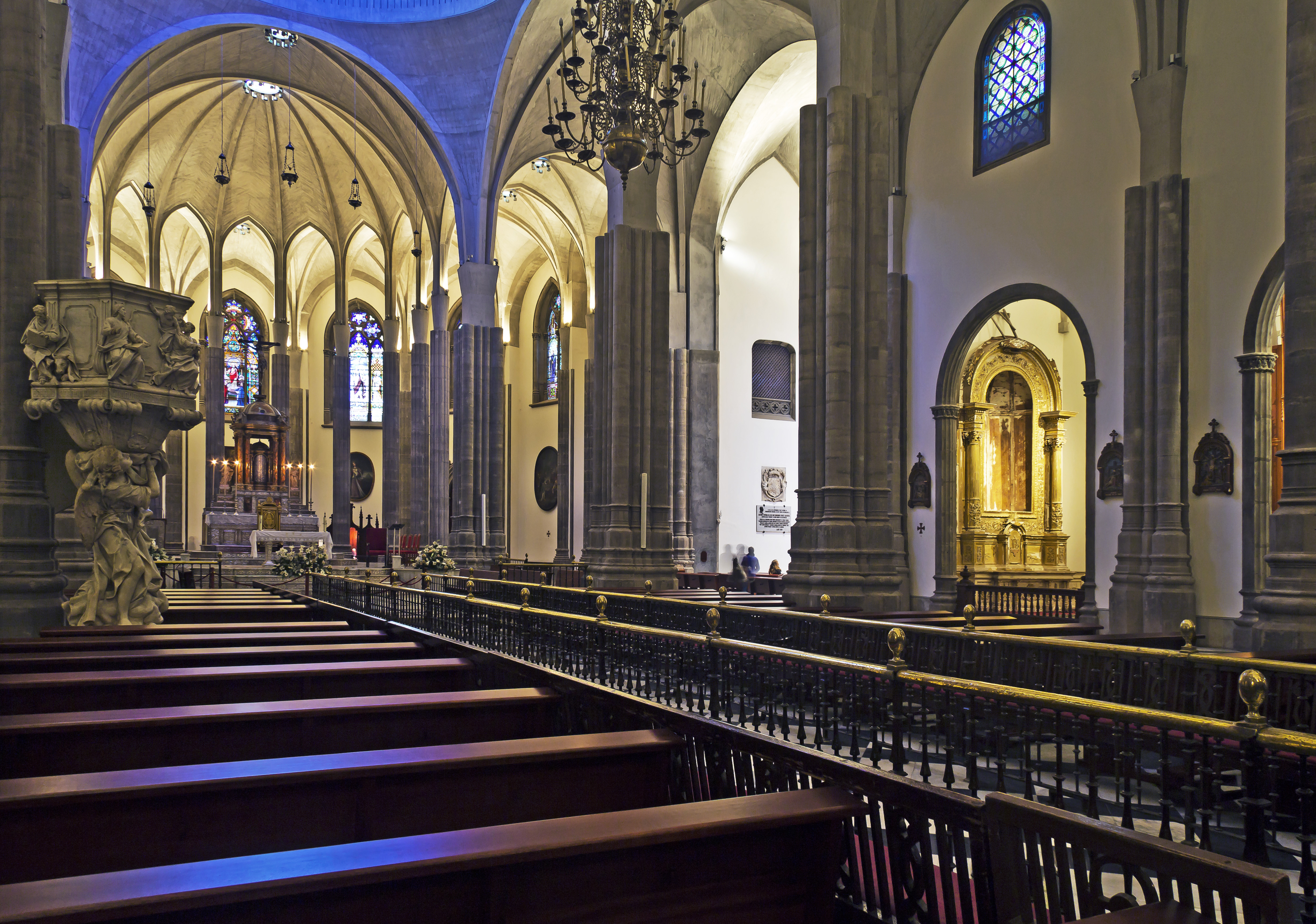 Hauptschiff, Hauptaltar und rechtes Seitenschiff der Kathedrale in La Laguna